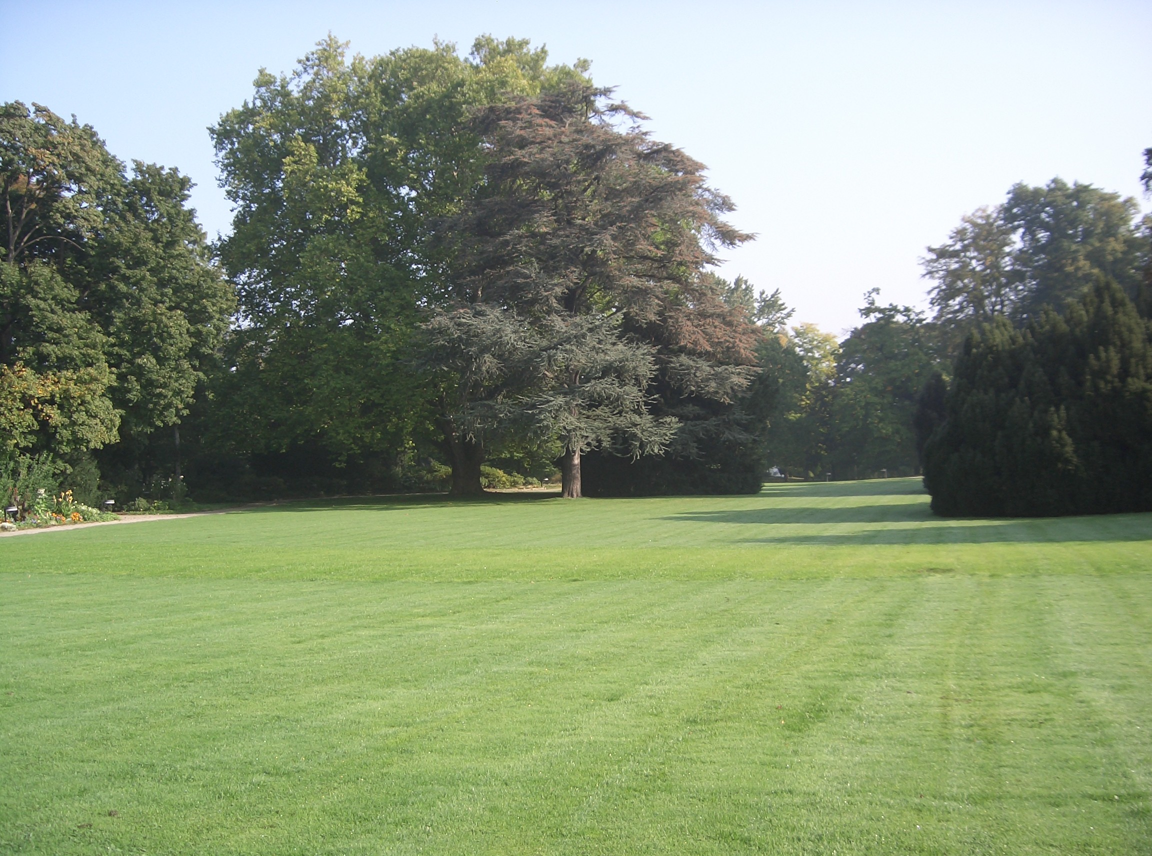 Palais Schaumburg in Bonn, Park Schaumburg